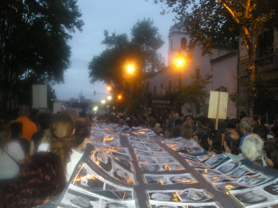 Marcha 30 años del golpe militar de 1976. Buenos Aires.